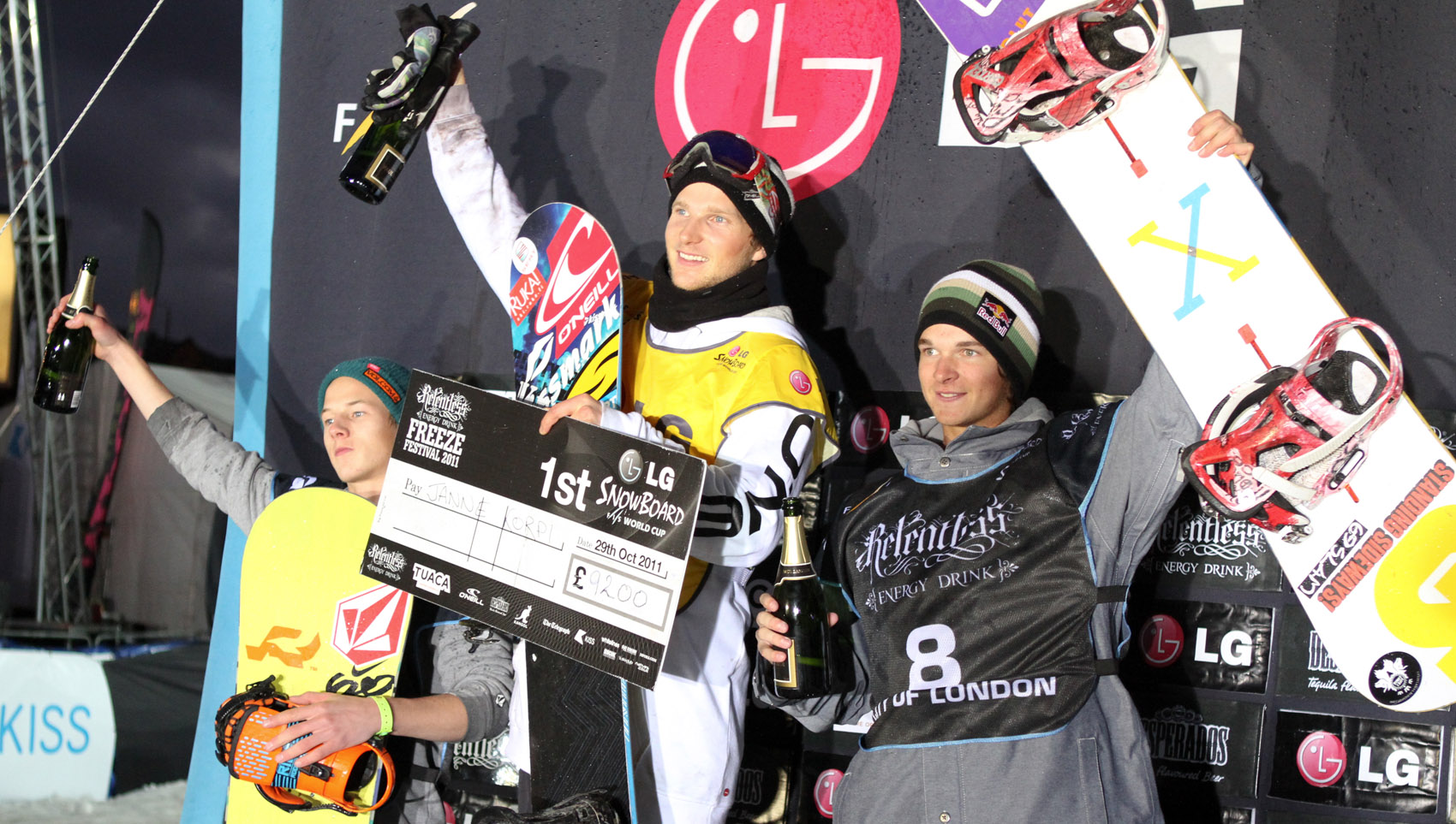 지난 29일 영국 런던 문화의 상징 '배터시 발전소(Battersea Power Station)'에서 펼쳐진 2011~2012 시즌 'LG 스노보드 월드컵' 대회 시상식 장면. 왼쪽부터 네덜란드의 요리스 아월켈크(Joris Ouwerkerk, 3위), 핀란드의 얀느 콜피(Janne Korpi, 1위), 벨기에의 세피 스미츠(Seppe Smits, 2위). ※ LG전자 뉴스룸 에서 관련 보도자료를 확인실 수 있습니다.